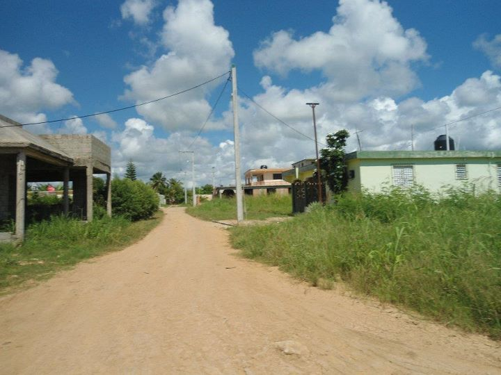 Calle tipica del sector de Villa Cesarina en San Pedro de Macoris